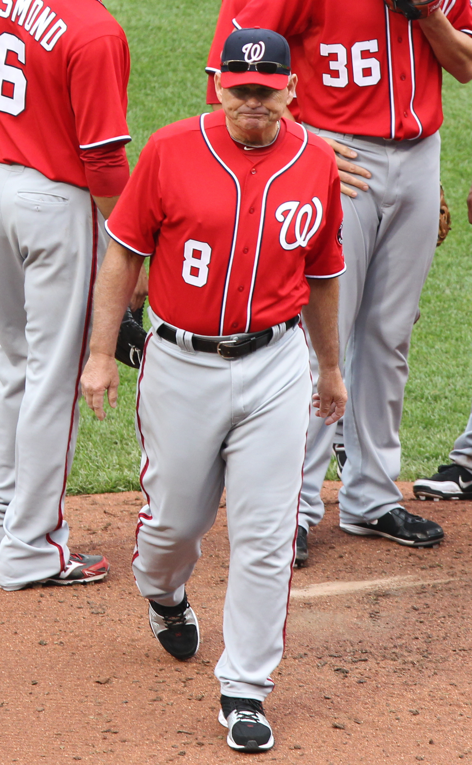 John McLaren